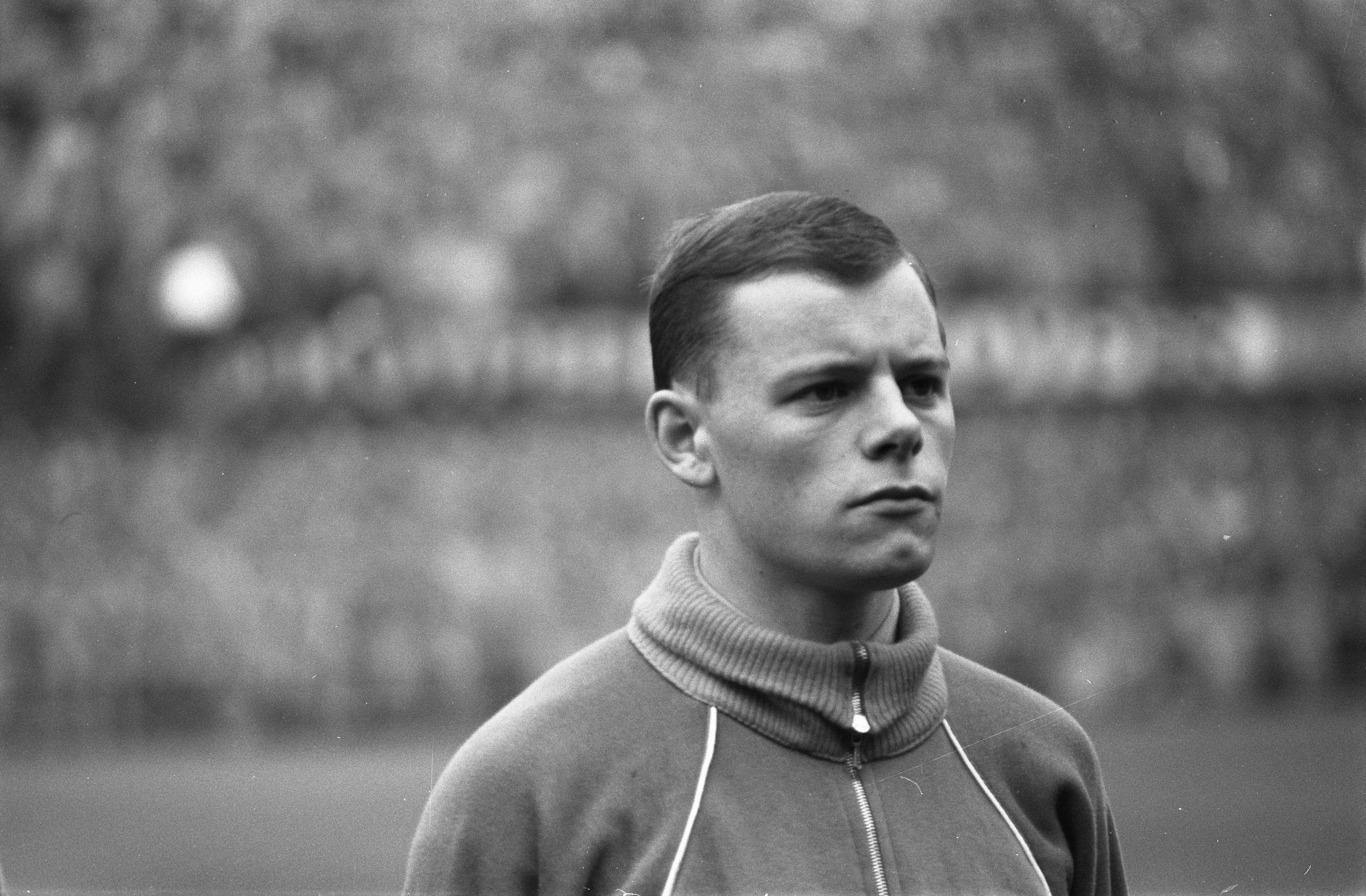 Photographie du footballeur international néerlandais Gerard Bergholtz avant un match contre la Hongrie (0-3) par Wim van Rossem / Anefo (Rotterdam, 1961).